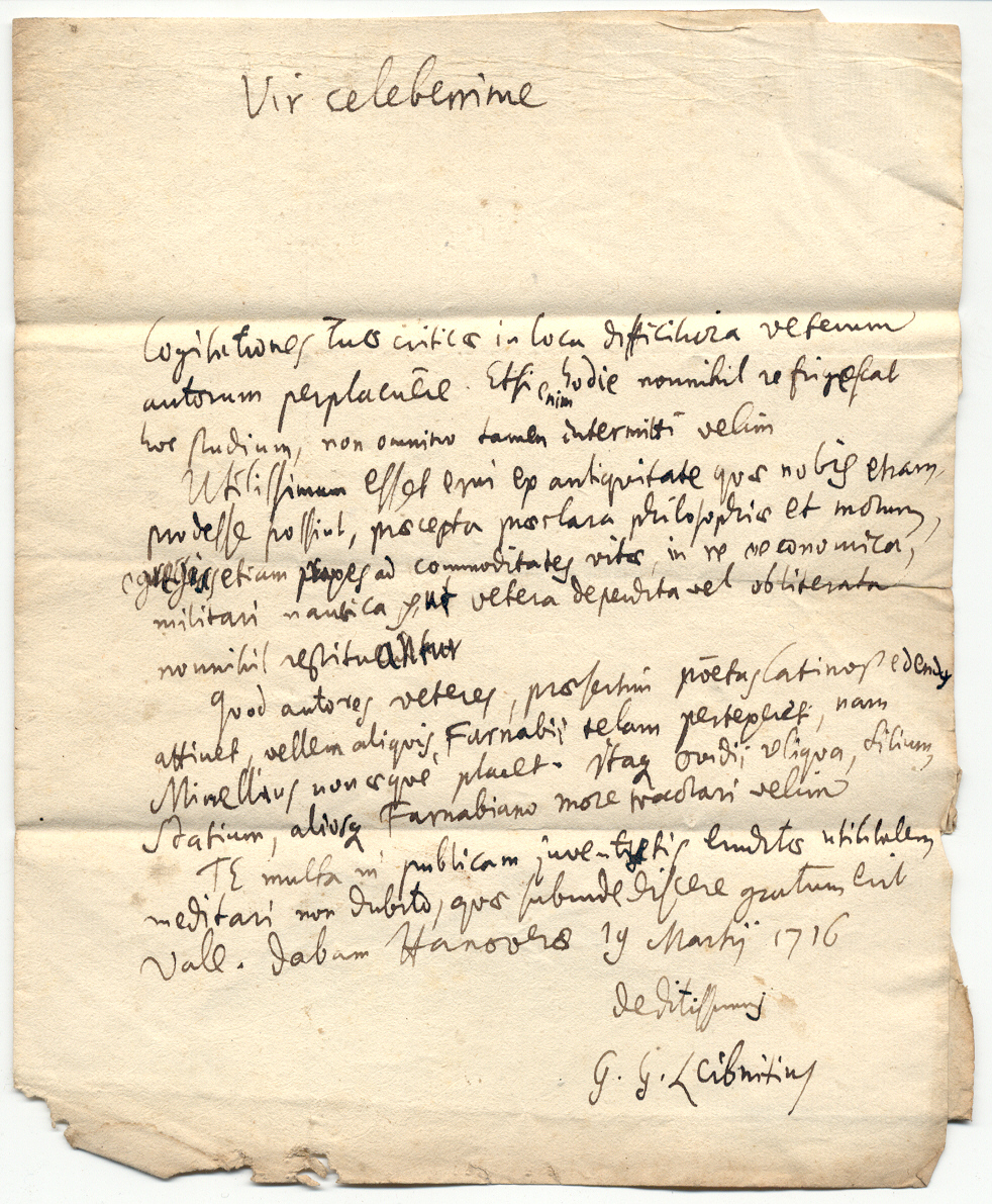 einer von zwei handschriftlichen Briefen nach Kiel aus dem Jahre 1716, eine Veröffentlichung betreffend